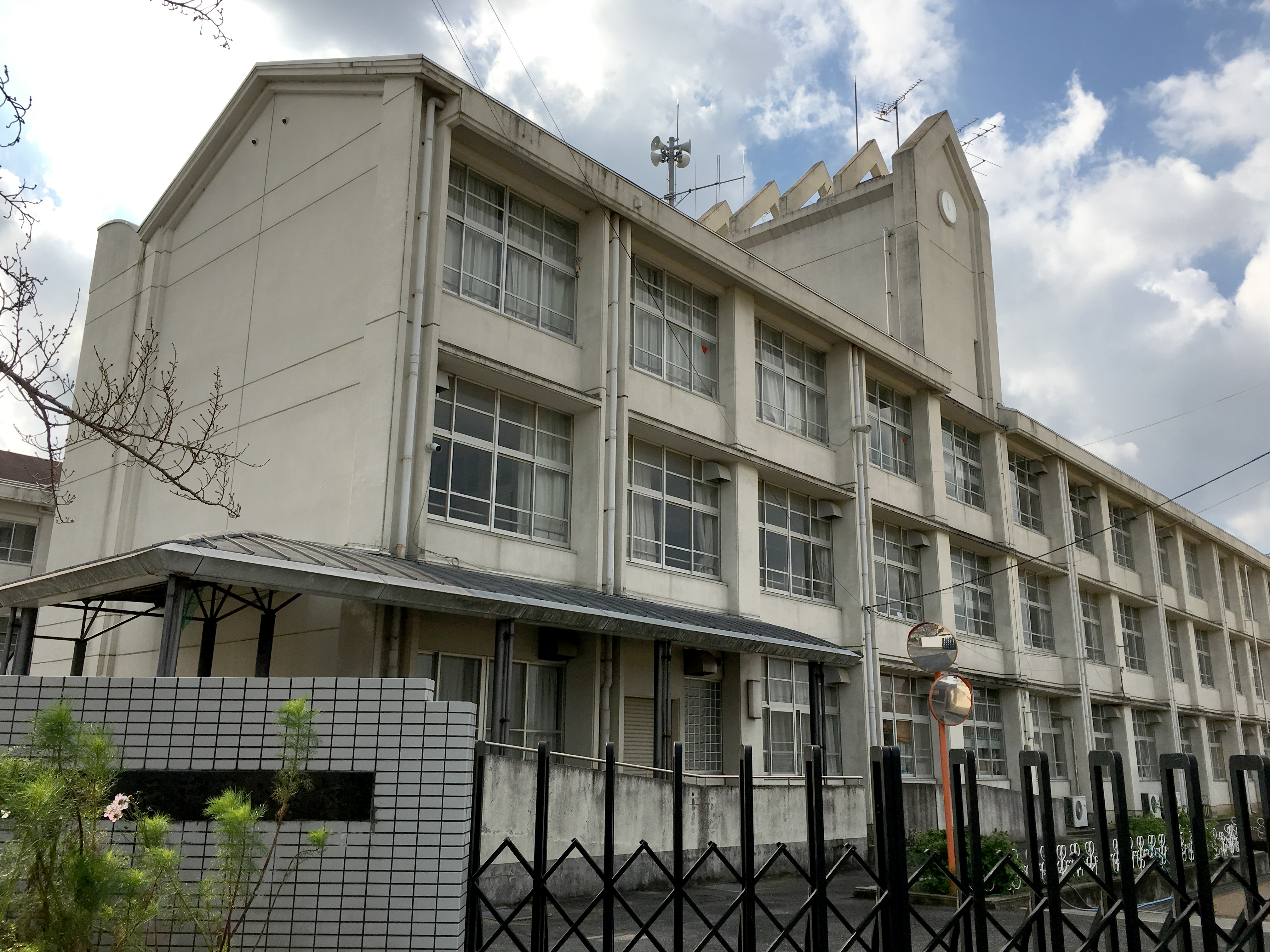 羽曳野市立西浦東小学校